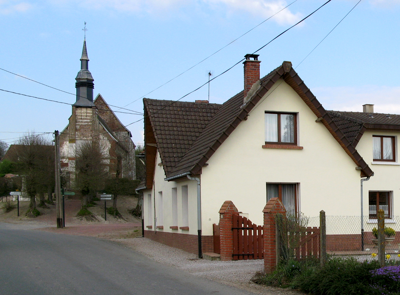 Sibiville (Pas-de-Calais, France) - . .